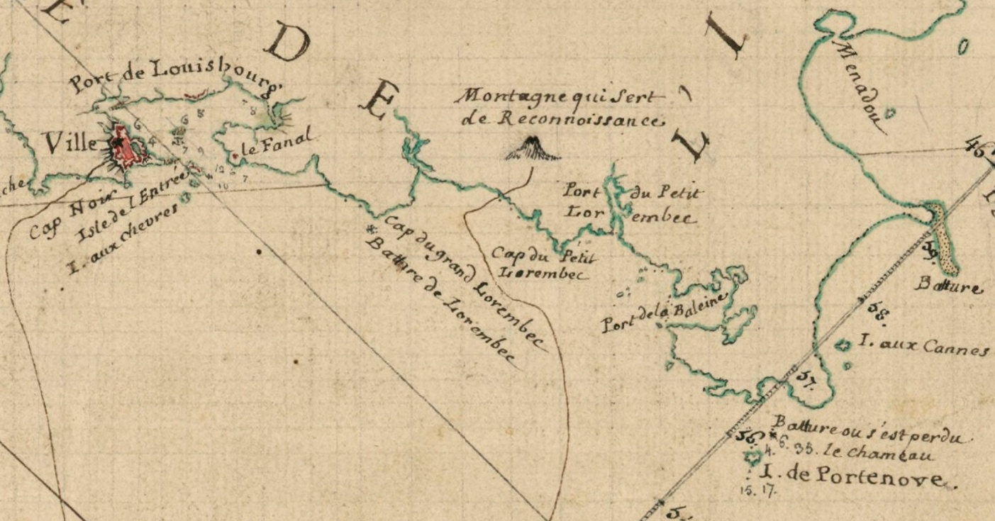 Nom exact : Carte particulière des costes du Sud-Est de l'Isle Royale. Document levé en 1750 - 1751 par Joseph-Bernard de Chabert. Détail de la côte allant de Louisbourg jusqu'au lieu du naufrage de la flûte le Chameau en 1725. NB : les battures sont des récifs à fleur d'eau qui découvrent à marée basse.